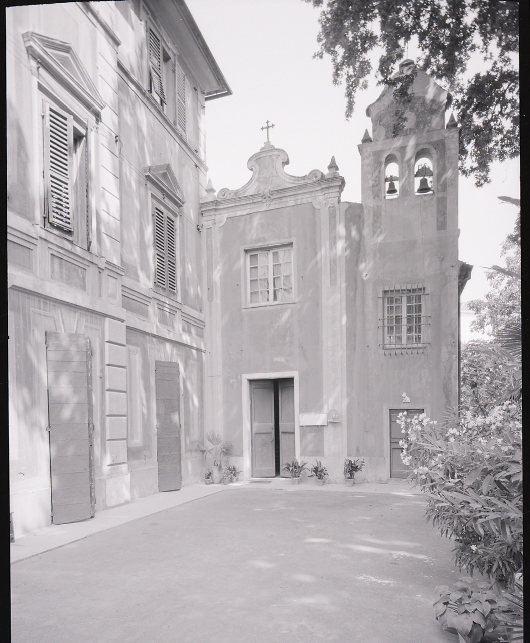 Servizio fotografico : Genova, 1963 / Paolo Monti. - Buste: 4, Fototipi: 4 : Negativo b/n, gelatina bromuro d'argento/ pellicola ; 10x12. - ((Serie costituita da 4 buste sciolte di negativi identificati con i nn.: 6994, 6995, 6996, 6997. - Su rubrica denominata "R 1 - Monti/ 1 aprile 1963 - 6 giugno 1964/ 6000-8193" in corrispondenza dell'indicazione della suddetta serie appunto manoscritto: "villa ora falegnameria". - Il negativo identificato con il numero 46397 è stato realizzato per Zodiac. - Occasione: Documentazione per la pubblicazione: Italia Nostra (a cura di), "Le ville genovesi", catalogo della mostra, Genova 1962, Genova, Comune di Genova, 1967. - Fonte: Monografia di Italia Nostra (a cura di): Le ville genovesi, catalogo della mostra, Genova 1962, Genova, Comune di Genova (1967). - Fonte: , presso Archivio Paolo MontiLettera di Paolo Monti: I. Carteggi/ Genova - Enrico (1963-1966), presso Archivio Paolo Monti. Camicia con documenti dattiloscritti e manoscritti vari relativi al lavoro eseguito per Italia Nostra: preventivi, lettere, inventari. - Fonte: Rubrica di Paolo Monti: Archivio fino 1-4-1961/ 31-3-1963 (1961-1963), presso Archivio Paolo Monti. - Fonte: Agenda di Paolo Monti: R 1 - Monti/ 1 aprile 1963 - 6 giugno 1964/ 6000-8193 (1963-1964)